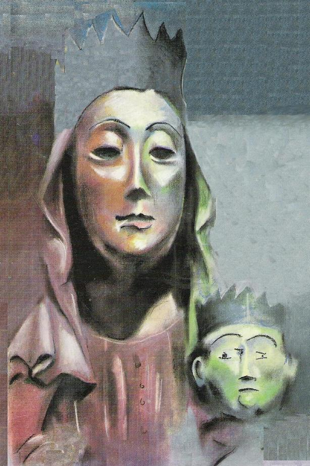 Virgen del Hinojal, pintura astracta